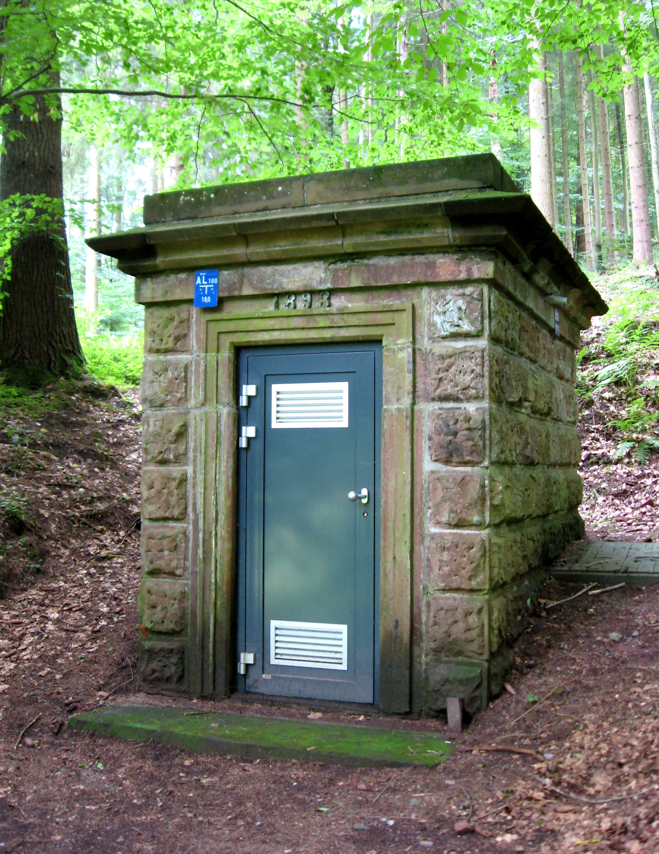 Wasserbehälter nordwestlich von Eußerthal Im Dürrental; kubischer Bossenquaderbau, Flachdach, bezeichnet 1893